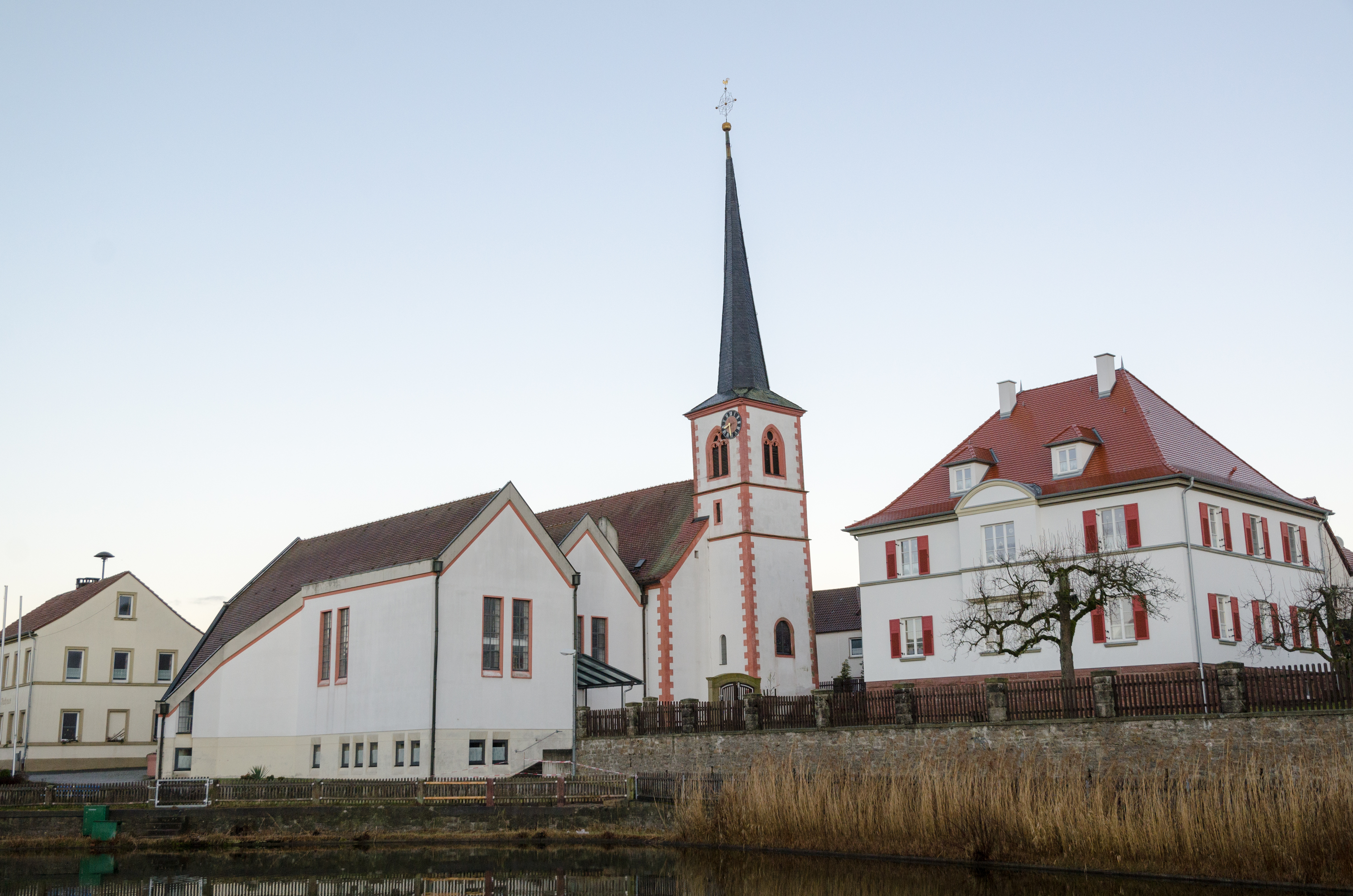 St. Simon und Judas Thaddäus in Wasserlosen